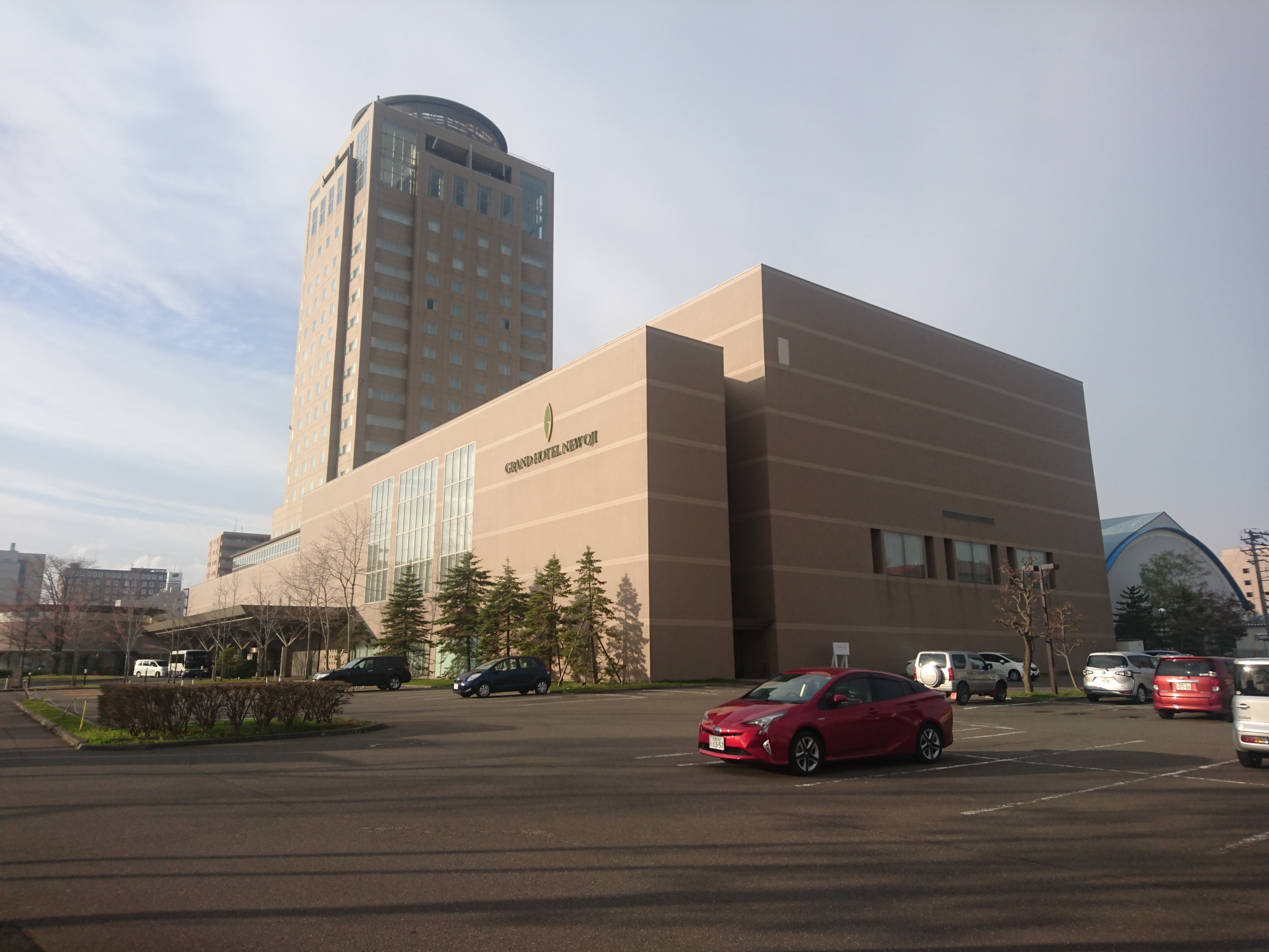 グランドホテルニュー王子（苫小牧市 2017年5月6日）